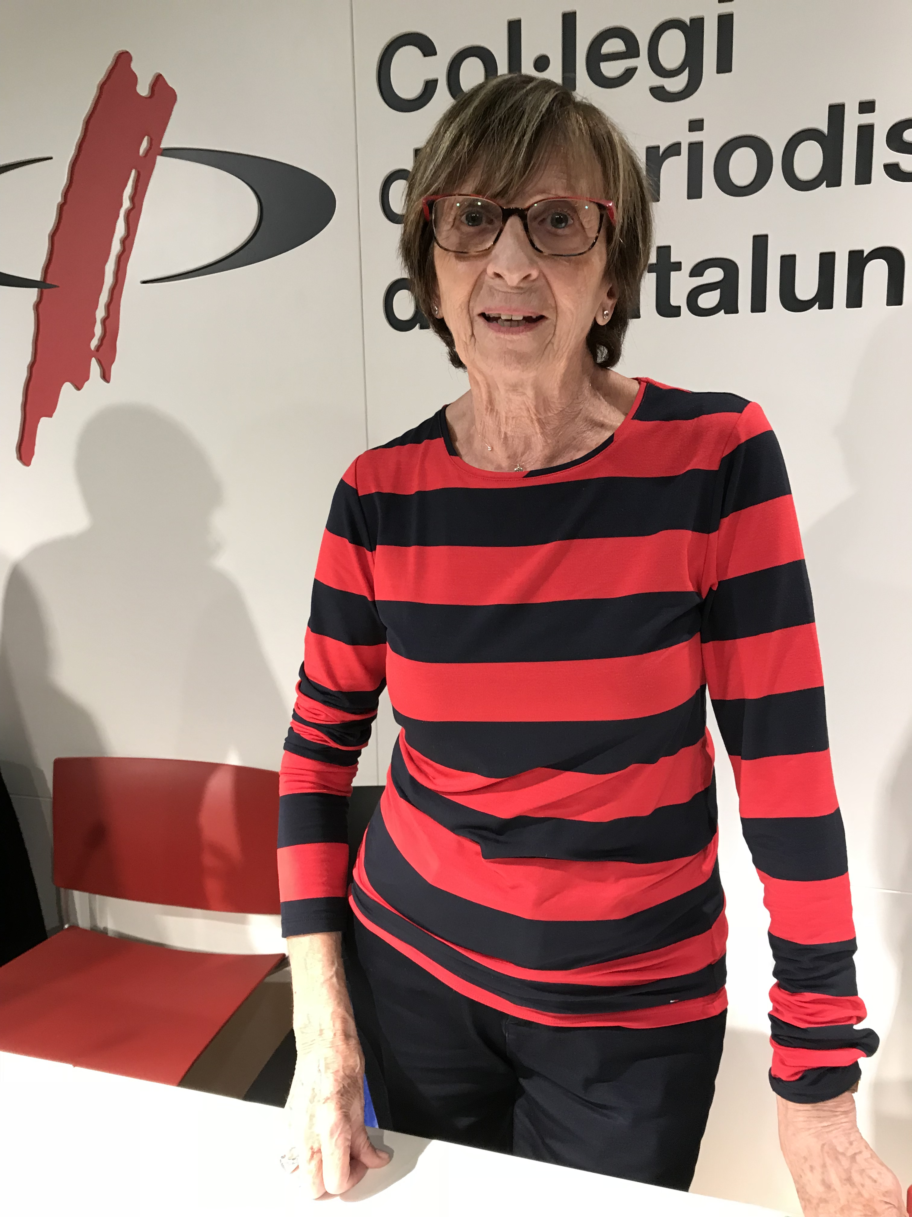 En el Colegio de Periodistas de Cataluña